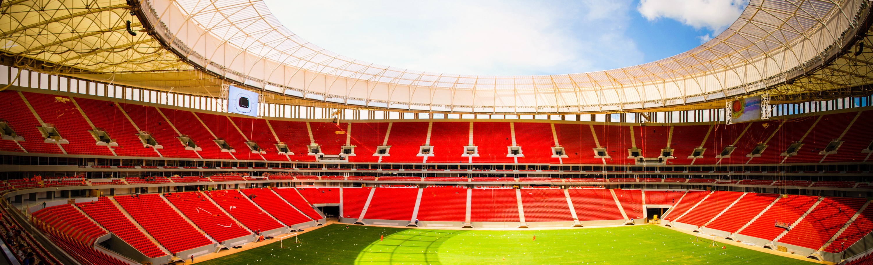 Vista panorâmica do interior do estádio após a conclusão de sua reconstrução de 2010-2013.